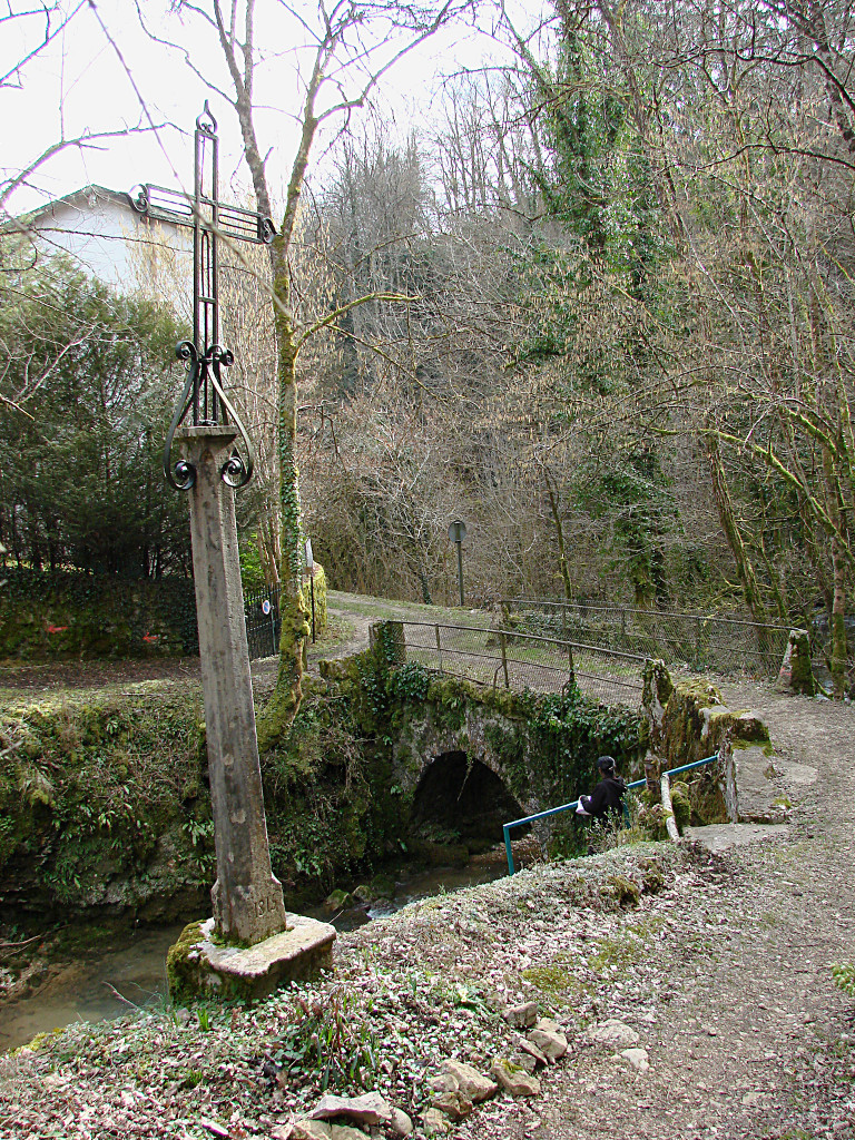 Vue du Brévon (Saint-Rambert-en-Bugey ) : pont antique et croix commémorative du martyr de Ragnebert